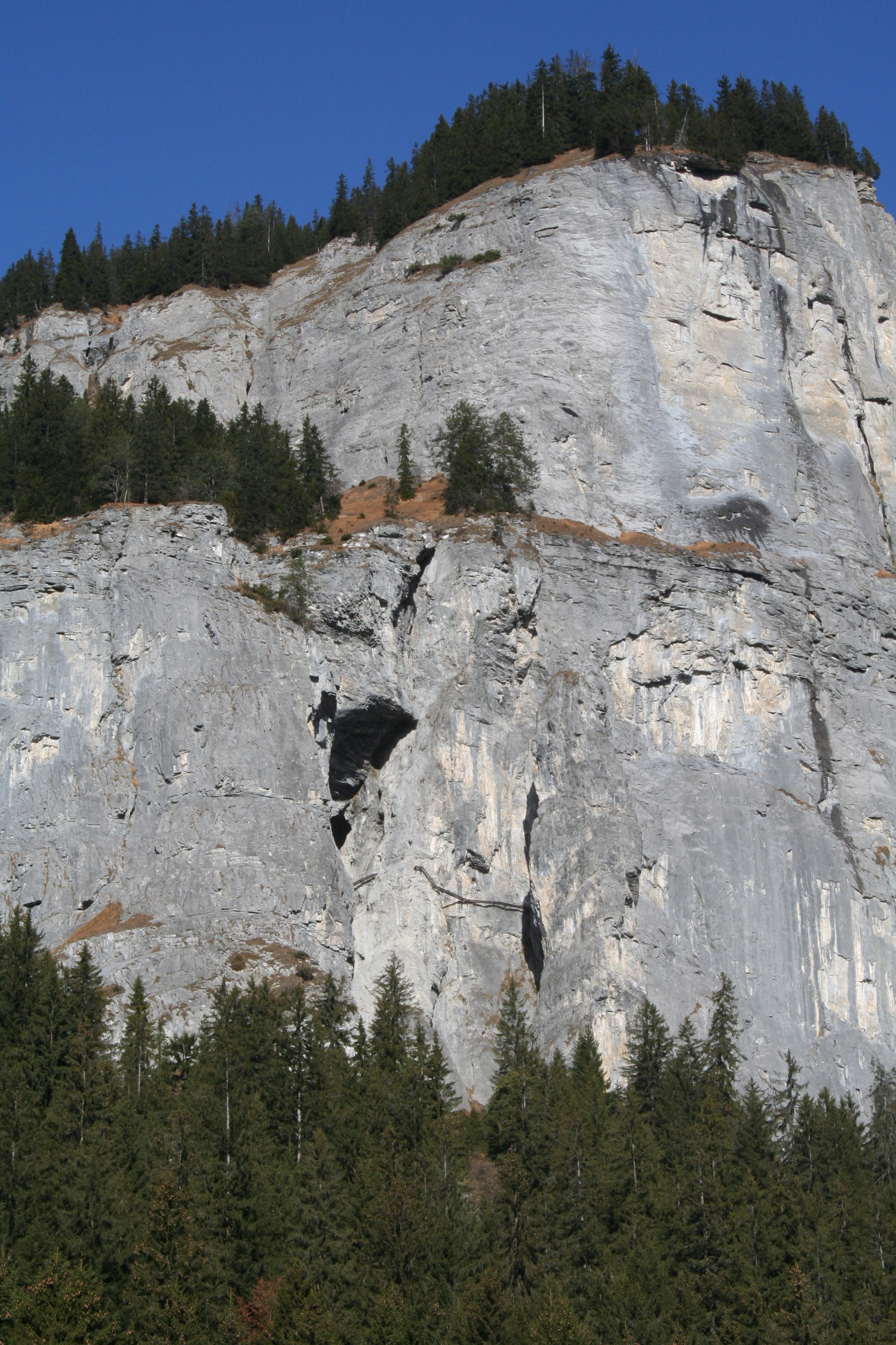 Klettersteig Pinut am Flimserstein, unterhalb der Bildmitte sind Leitern erkennbar